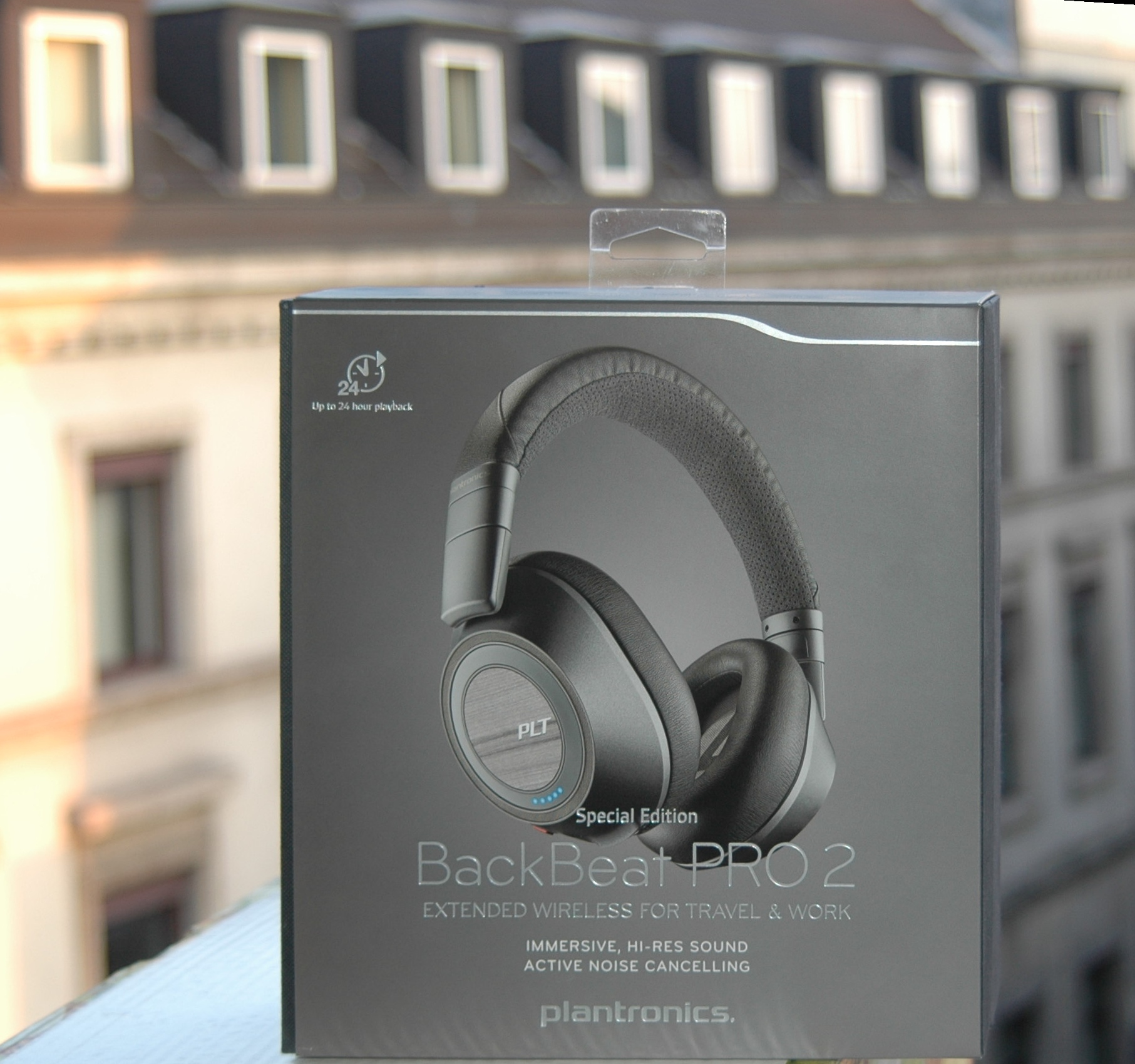 Plantronics BackBeat PRO 2 Box